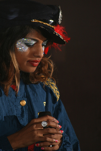 MIA newcastle digital music